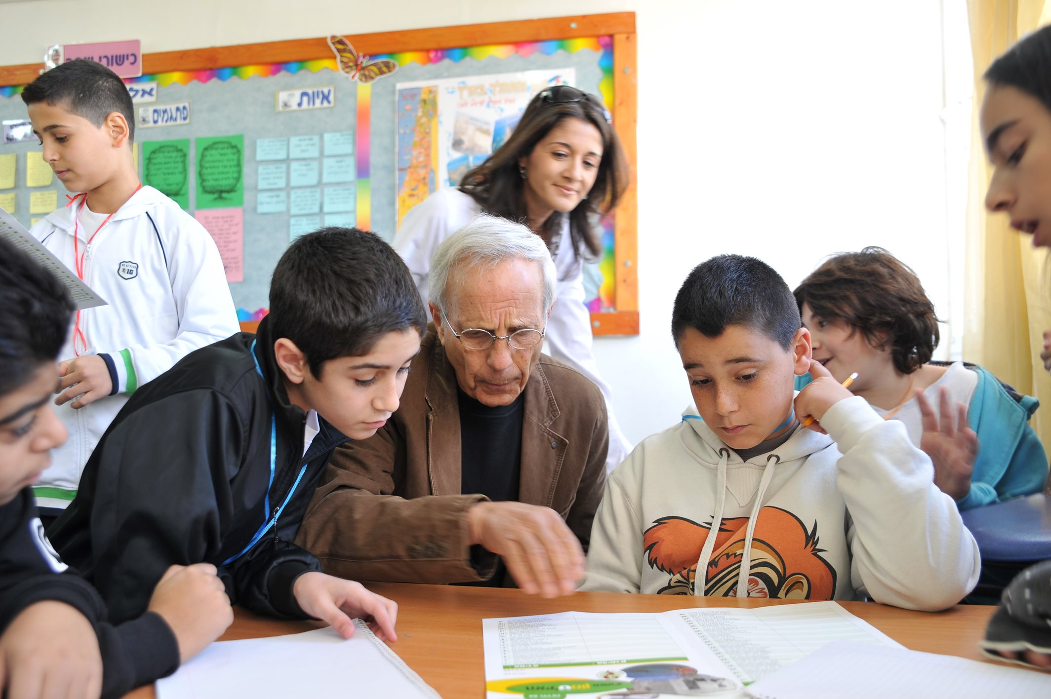 הנוער מתענין בחידות חמיצר